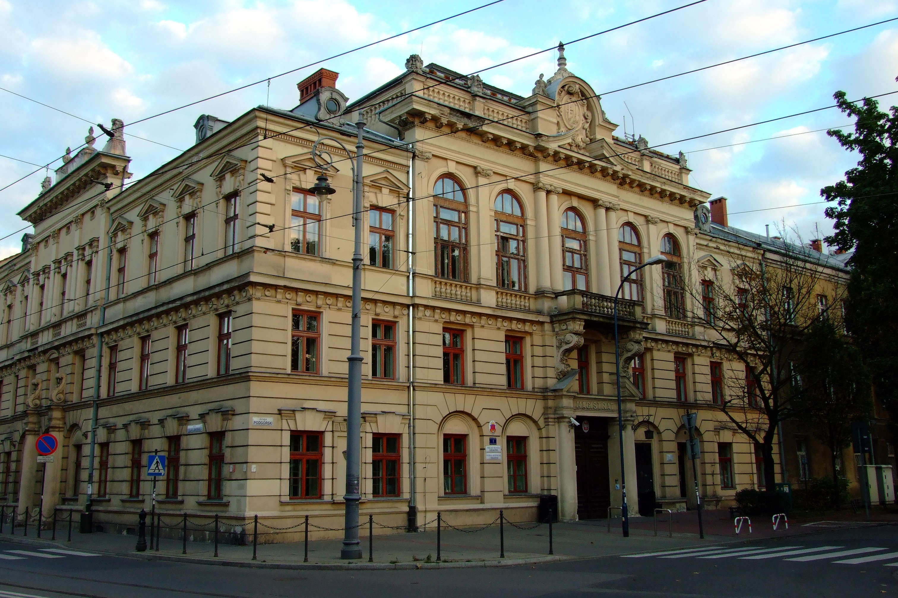 nowy ratusz dawnego miasta Podgórza, Rynek Podgórski 1, Kraków